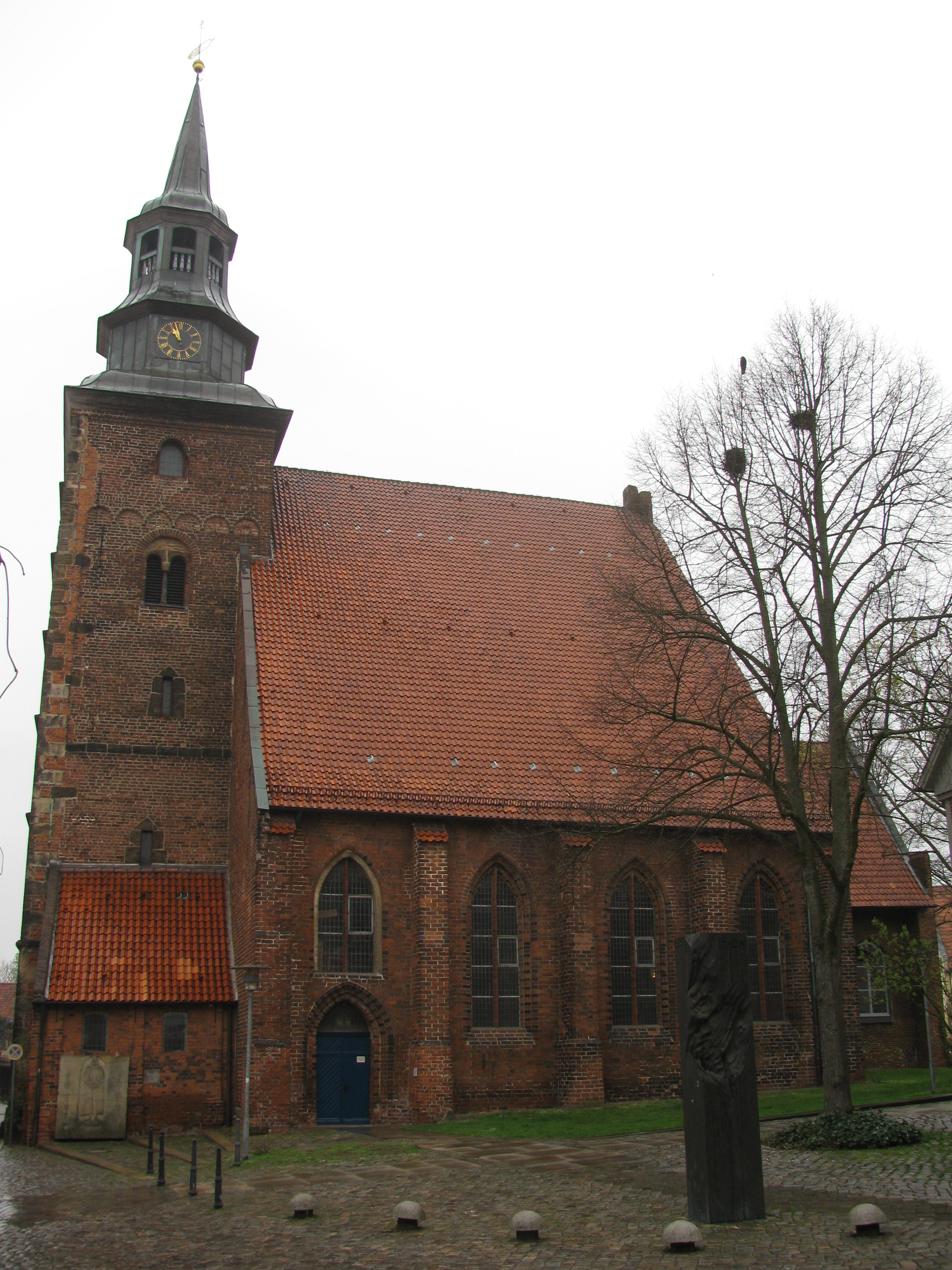 Verden (Aller), die St.-Johannis-Kirche von Süden.